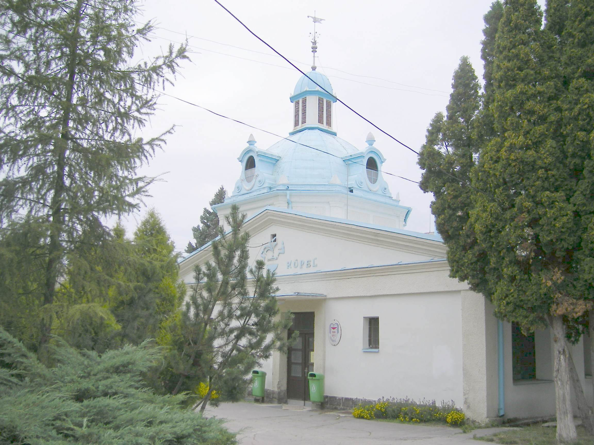 Turčianske Teplice